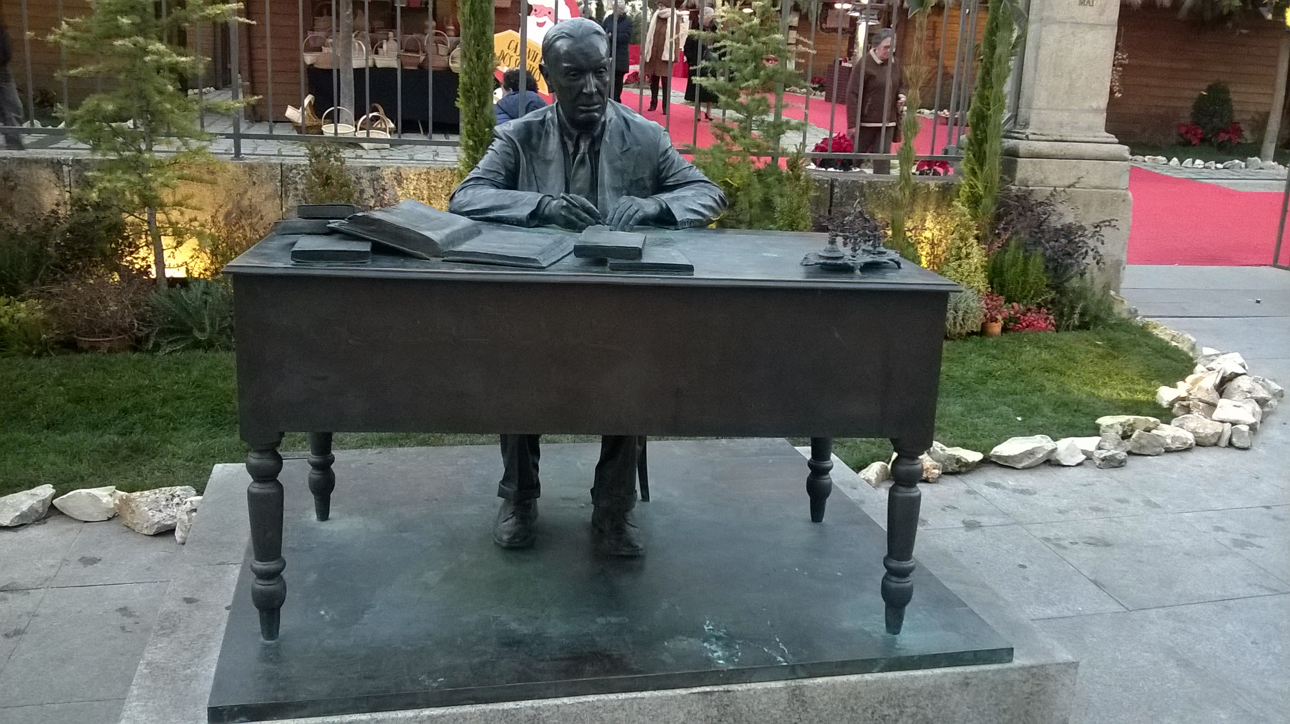 Monumento em homenagem ao escritor português Aquilino Ribeiro (1885-1963), rua Formosa (frente ao Mercado Municipal), cidade e distrito de Viseu, Portugal. Bronze, Yuraldi Rodríguez Puentes, 2013.